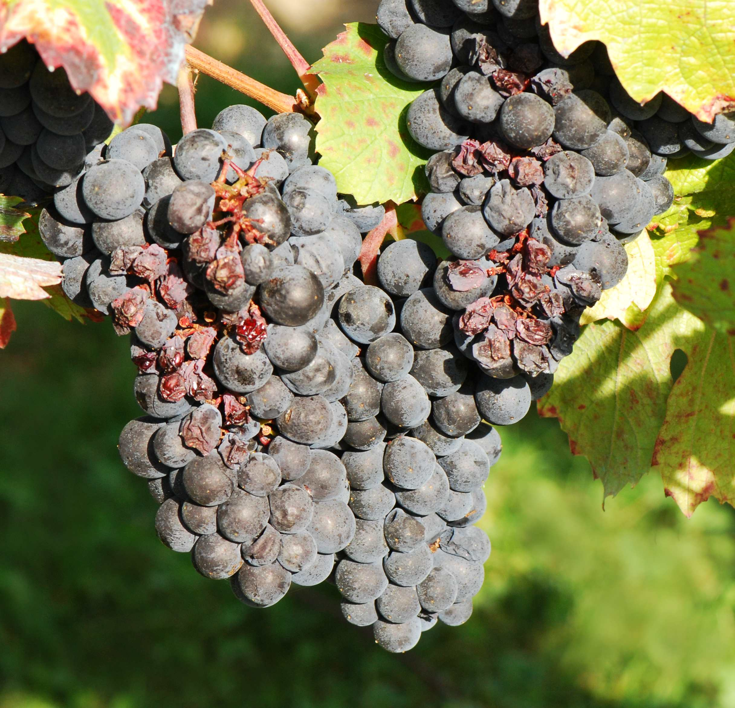 Gamay Fréaux, teinturier, raisi, conservatoire du vignoble charentais, 17 Cherves